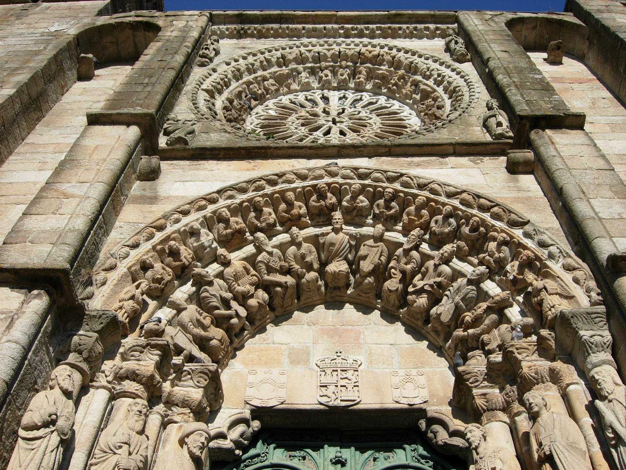 En la fachada occidental, un enorme rosetón se abre en la parte superior. Debajo aparece una magnifica portada en la que encontramos las figuras de los doce apóstoles en los fustes de las columnas y en una de las arquivoltas a los doce ancianos del Apocalipsis y a Cristo en la clave. En el tímpano fueron colocados posteriormente un escudo de Castilla y León franqueado por otros dos iguales del arzobispo Lope de Mendoza.